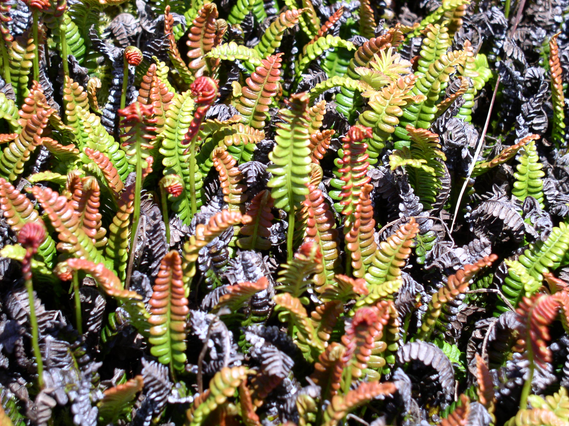 Blechnum penna-marina, ou Austroblechnum microphyllum (fougère). Photo prise sur l'île de la Possession (archipel Crozet).